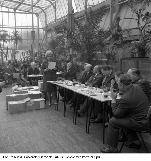 Czerwiec 1965, Zielona Góra. Eliminacje do I Festiwalu Piosenki Radzieckiej, obrady jury. Widoczny przewodniczący jury - Władysław Szpilman (siedzi za stołem 4. od lewej).